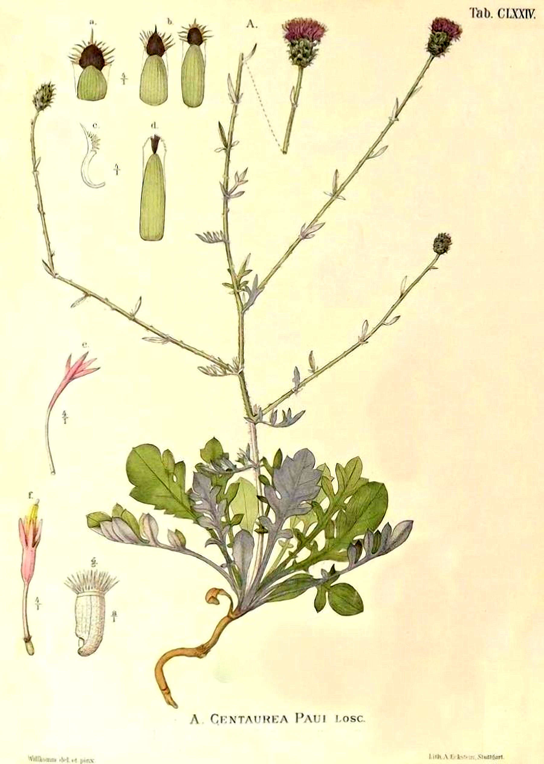 Centaurea paui - Tipo figurado por H.M. Willkomm. - a) Bráctea involucral externa; b) Brácteas involucrales medias; c) Bráctea involucral: vista lateral; d)Bráctea involucral interna; e) Flósculo periférico neutro; f) Flósculo central hermafrodita; g) Cipsela con eleosoma.